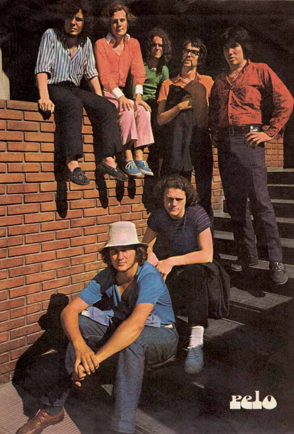 Las bandas argentinas Almendra y Manal, para la revista musical Pelo